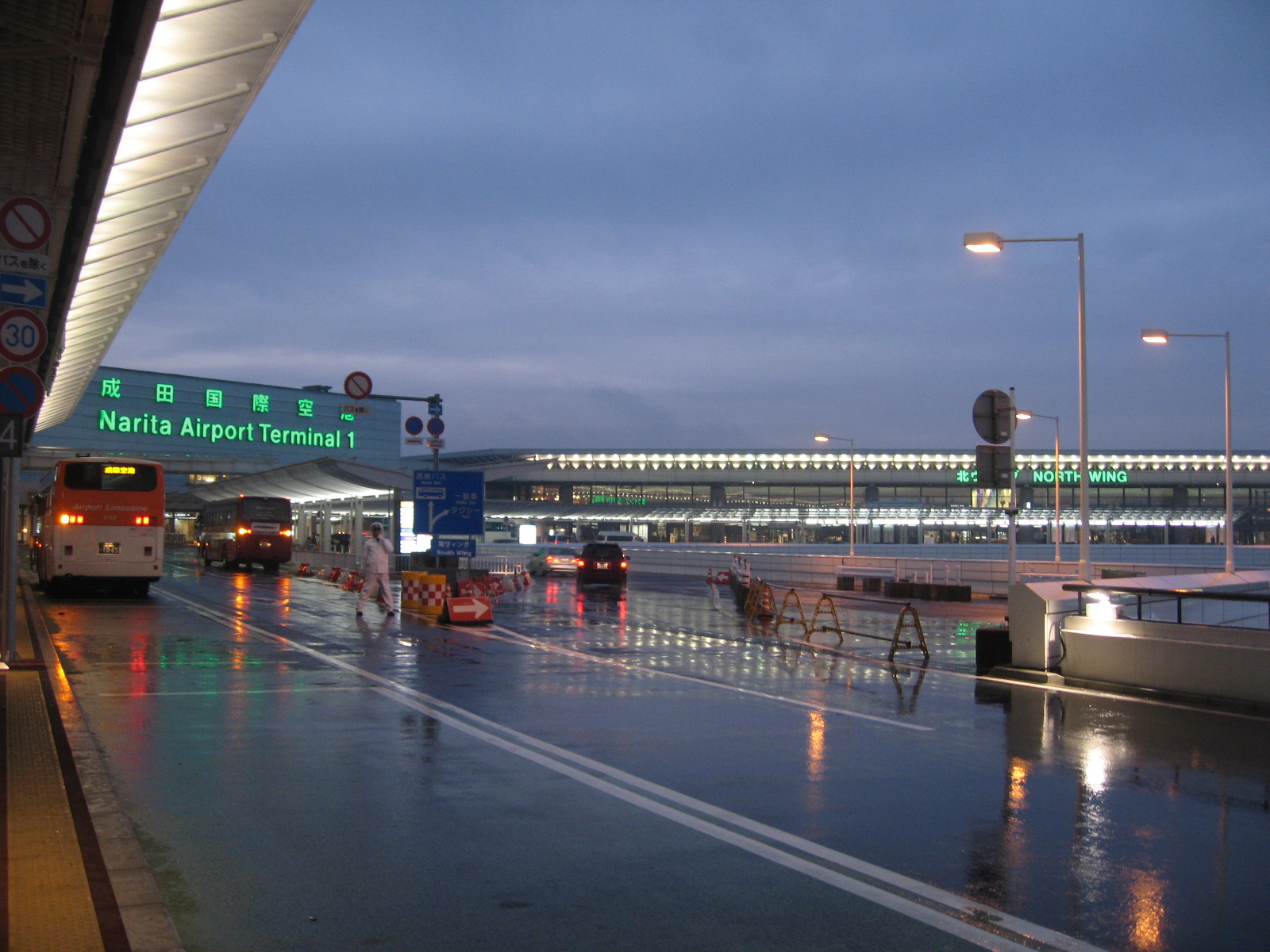 Narita International Airport, Terminal 1 departure entrance.